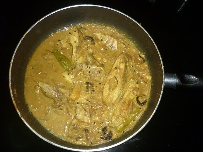 കരിമീൻ കറി